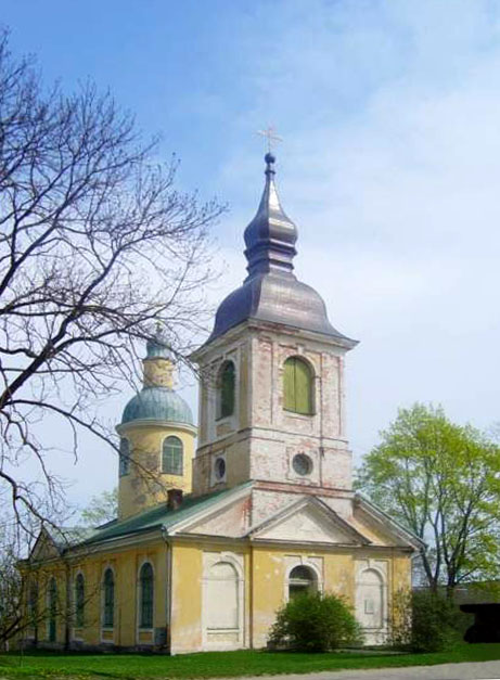 Võru Suurkannataja Ekaterina kirik